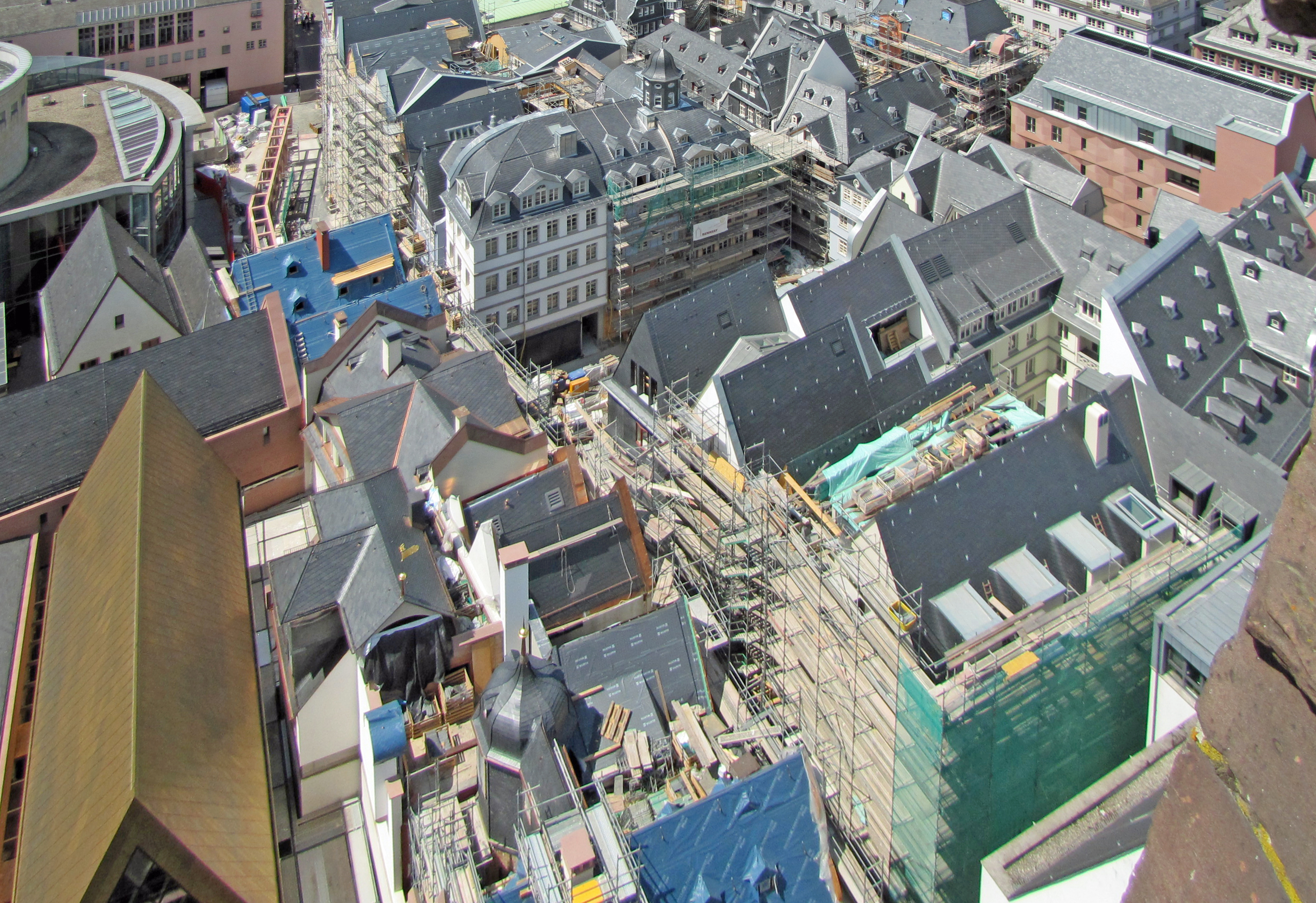 Das Dom-Römer-Projekt vom Domturm aus, im Juni 2017 in Frankfurt am Main.